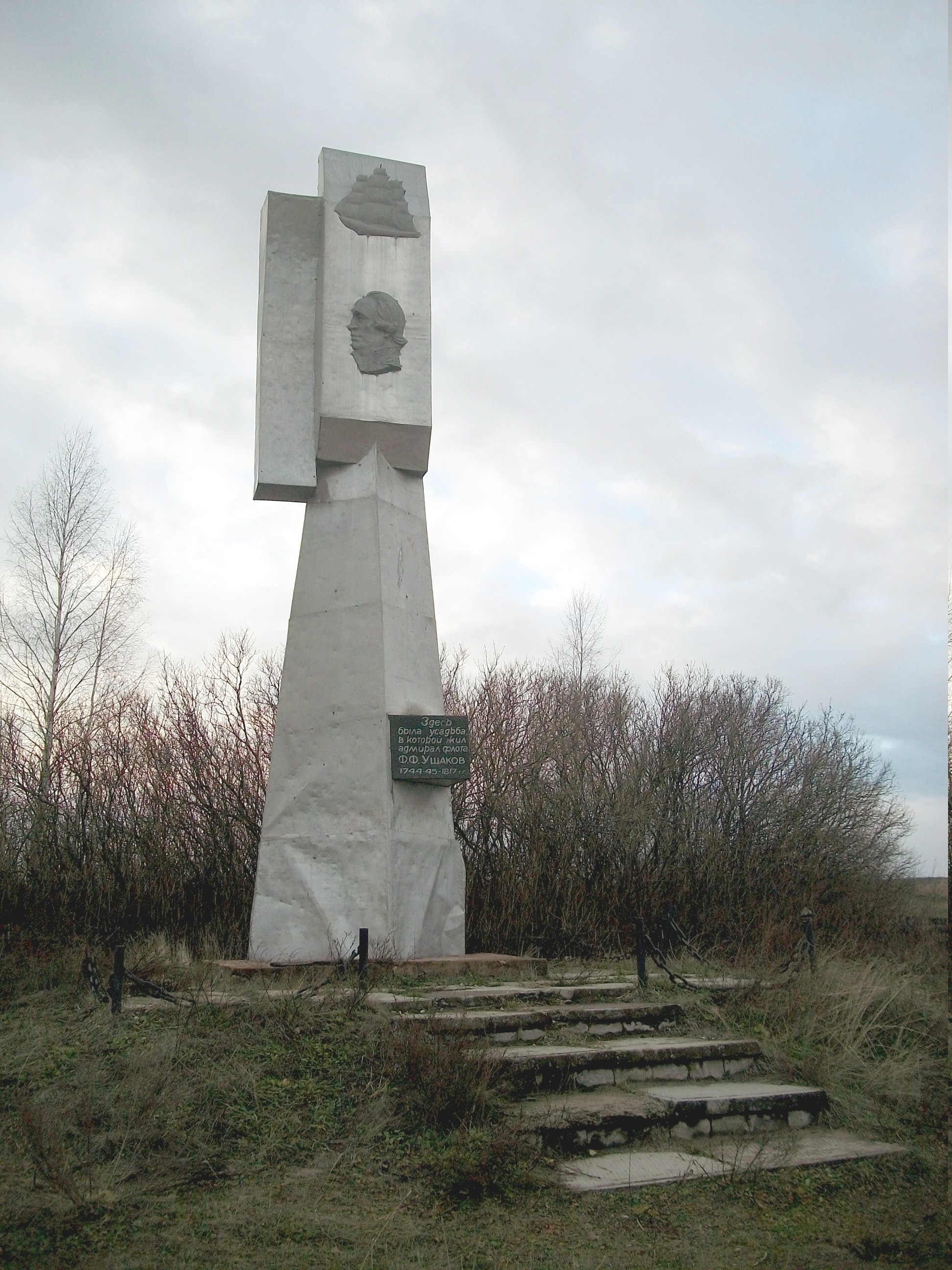 Памятник на месте, где прежде располагалась усадьба адмирала Фёдора Фёдоровича Ушакова. Село Алексеевка Темниковского района Мордовии. Надпись на табличке: «Здесь была усадьба, в которой жил адмирал флота Ф. Ф. Ушаков. 1744-45 — 1817 г. г.»